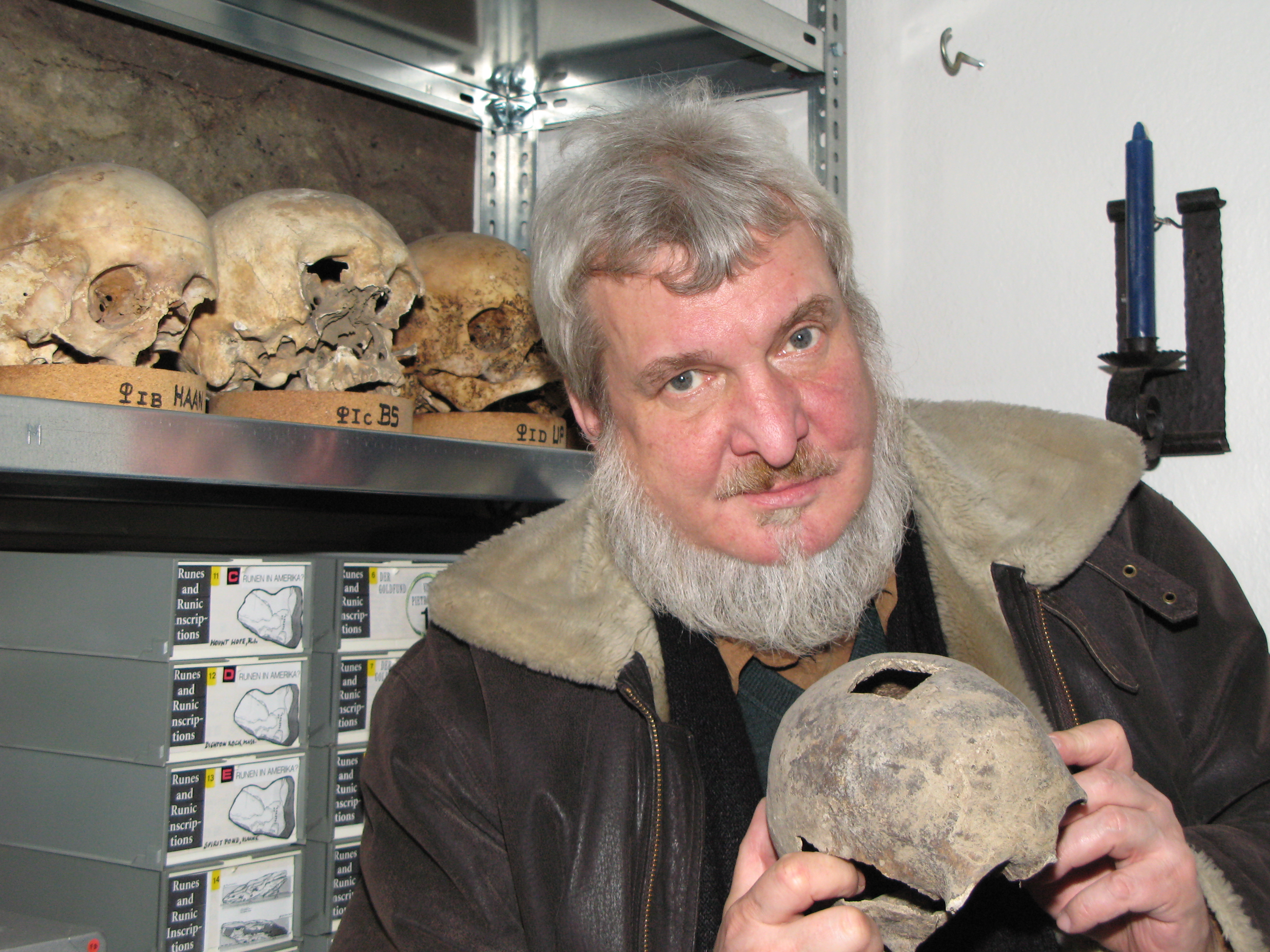 Fotografie des forensischen Archäologen Dr. Peter Pieper